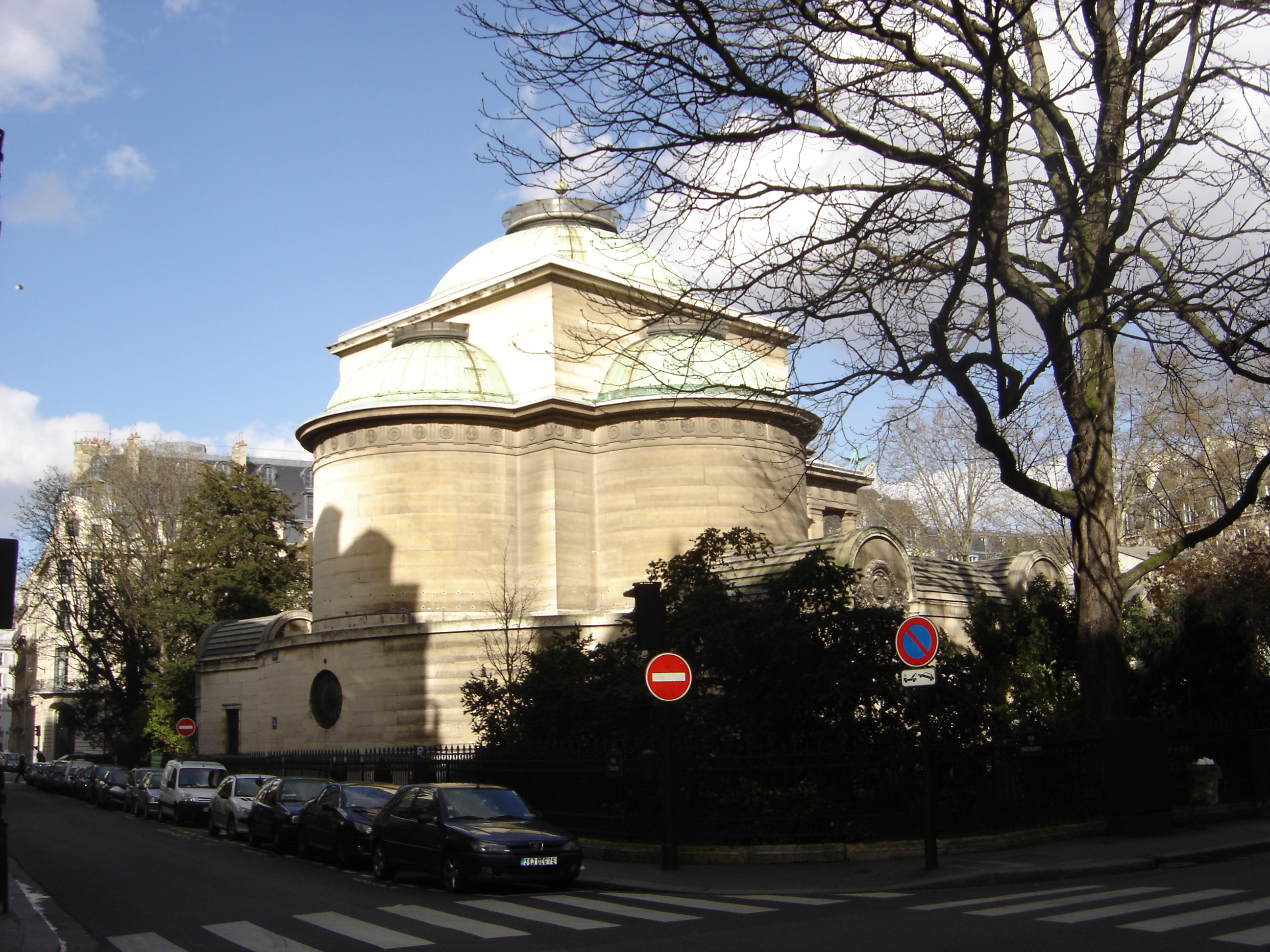 Chapelle expiatoire (Louis XVI) vue de la rue d'Anjou - Paris - France